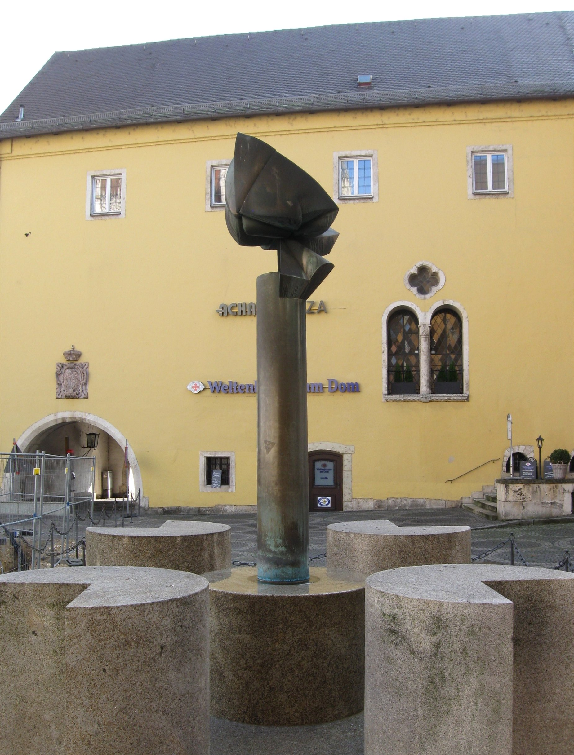 Albrecht-Altdorfer-Brunnen von Fritz Koenig, 1981/82, Bronze und Granit, auf dem Albrecht-Altdorfer-Platz, Am Domplatz in Regensburg. Im Hintergrund Westfassade Herzogshof, Regensburg.